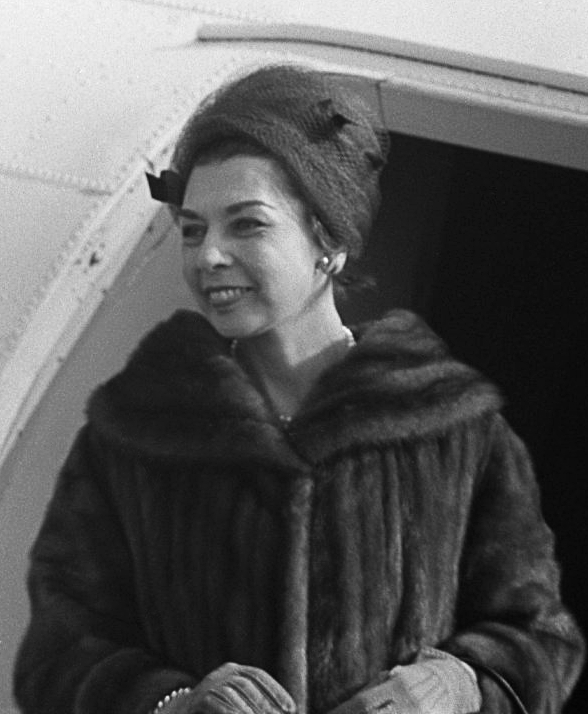 Clorinda Málaga de Prado (Vertrek van Dr. Manuel Prado van Ypenburg. Location: Den Haag, Zuid-Holland, Ypenburg)